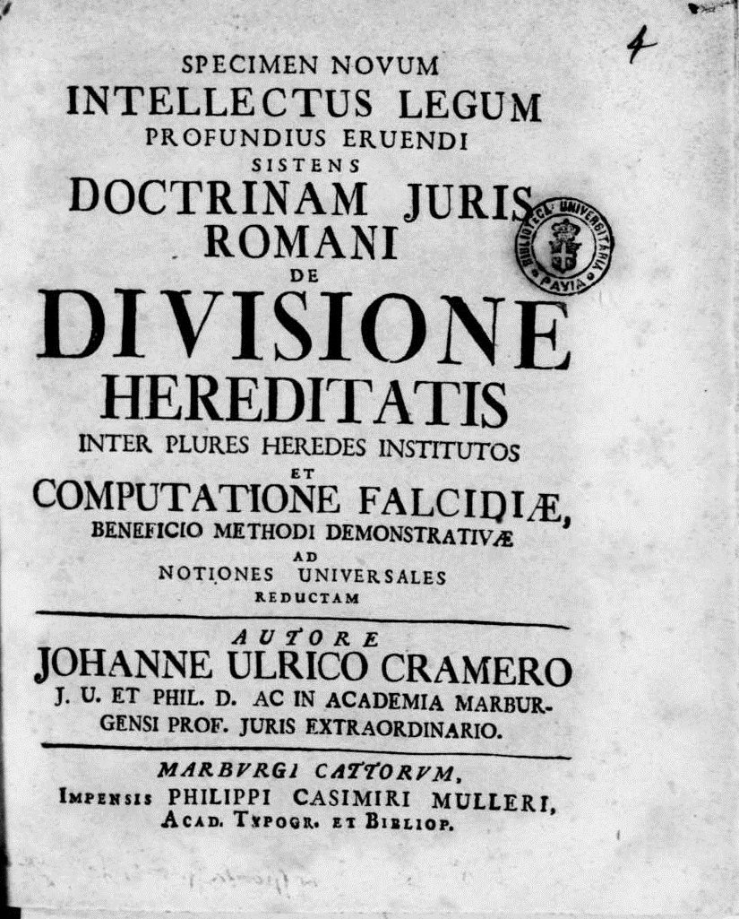 Frontespizio